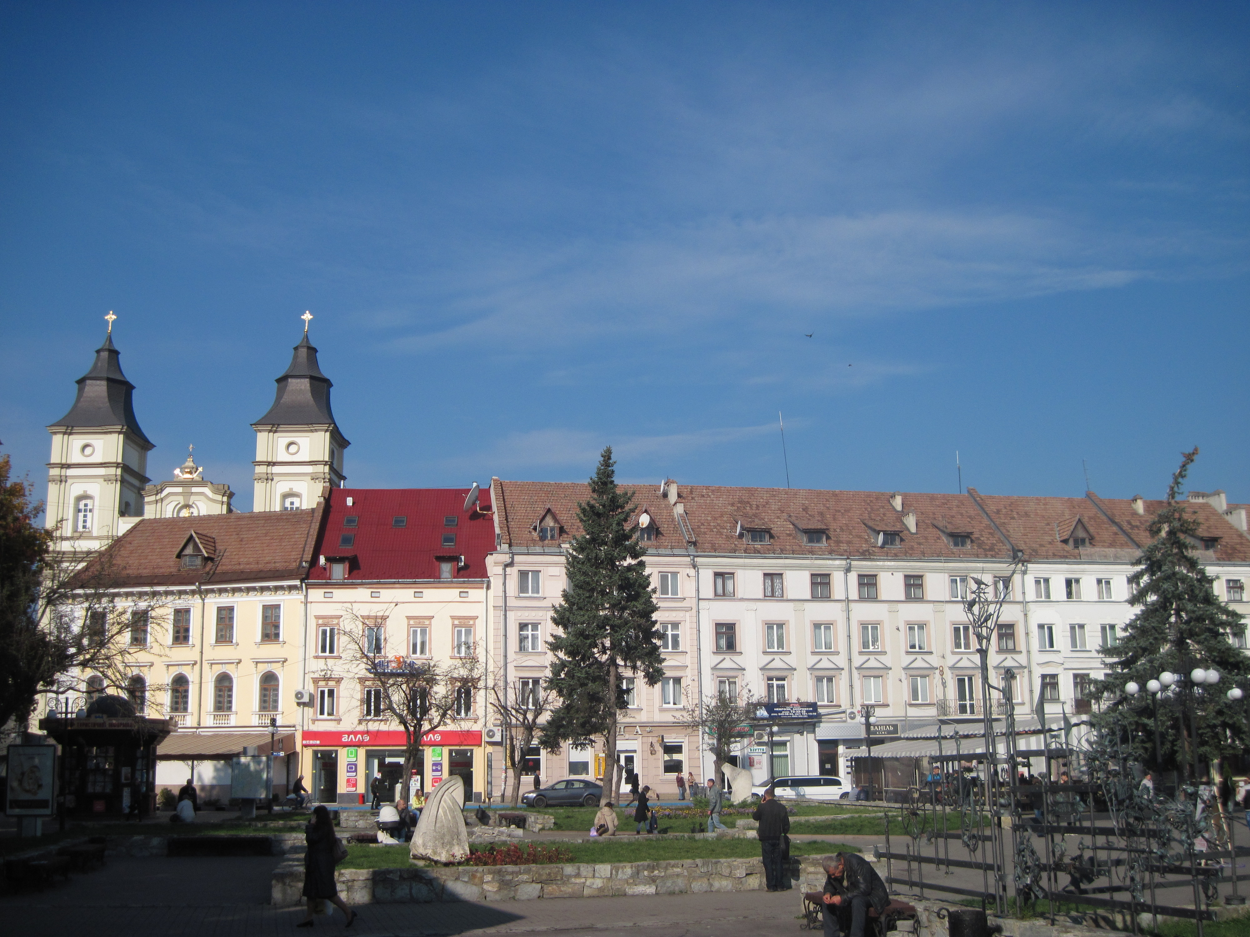 Ринок-пляц, Франківськ